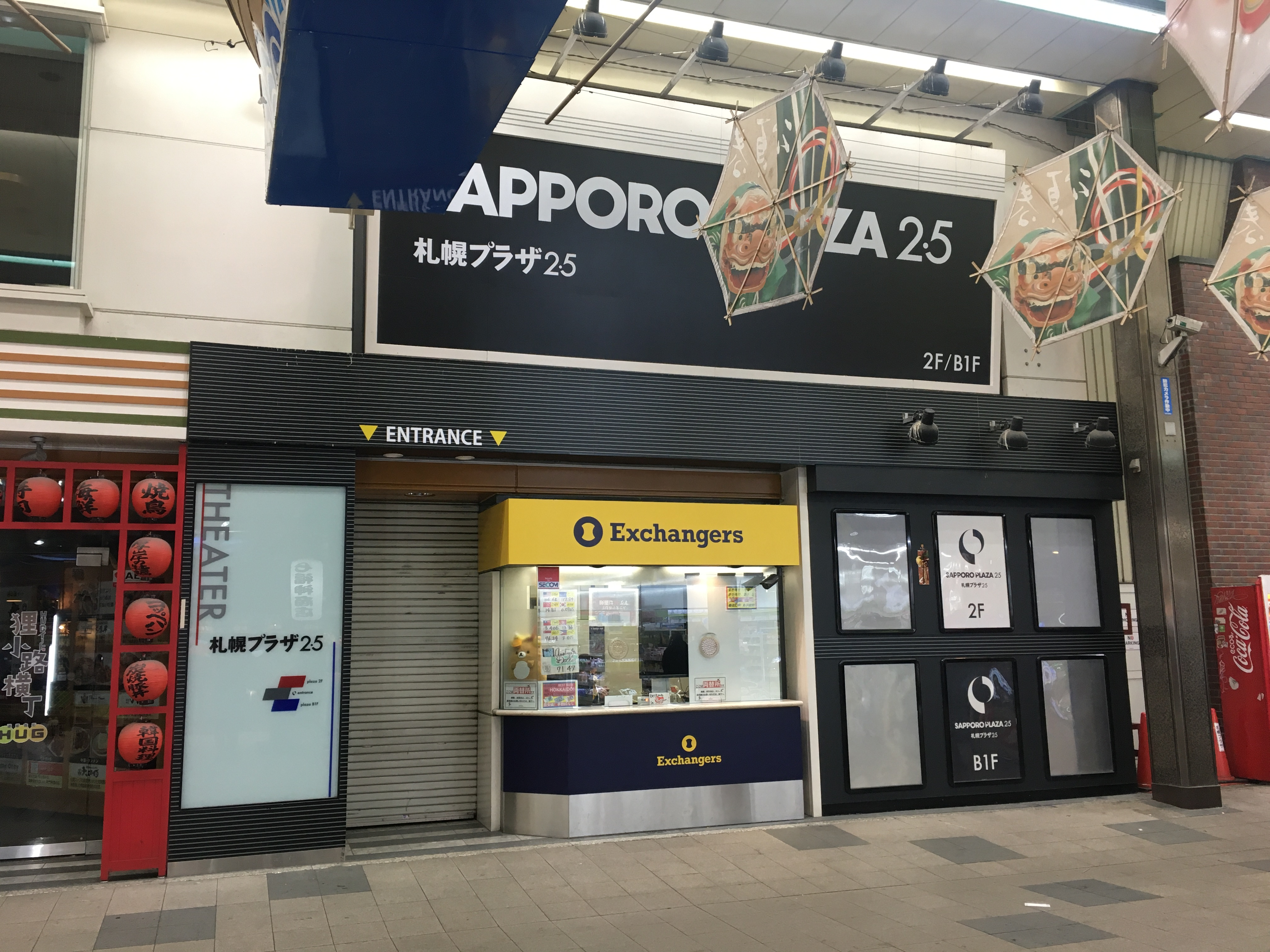 札幌プラザ2・5（札幌市中央区）